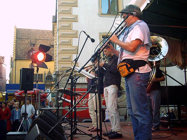 Regensburg (Bayern): Bayerisches Jazzweekend 2004 - Konzert auf dem Kohlenmarkt. Im Hintergrund das Rathaus und der Reichstag Bildautor: Peter Bubenik - Aufnahmedatum: 09.07.2004 - Lizenz: GNU-FDL Mehr Bilder aus Regensburg: Ein Abend an der Donau bei der Steinernen Brücke... Als in Regensburg noch Straßenbahnen fuhren - Modell des Arnulfsplatzes um ca. 1960 Meditieren auf Rengschburgerisch: Der Spitalgarten in Stadtamhof an der Steinernen Brücke Das Wohnhaus des Astronomen Johannes Kepler und seiner Familie von 1626-1628 Dom St. Peter (2) Denkmal des Don Juan d'Austria, Sieger in der Seeschlacht von Lepanto Die Überreste der romanischen Kapelle St. Georg und Afra Die Neugestaltung des Neupfarrplatzes Mitte der 90er-Jahre fand nicht nur ungeteilte Zustimmung... Der Brückturm neben dem Salzstadel (2) Die historische Wurstküche ("Wurstkuchl") am Marc-Aurel-Ufer Das Ostentor Das "Bruckmandl" (Brückenmännlein) in der Mitte der Steinernen Brücke Zeugl (bair. für "Aushängeschild") des historischen Lokals "Zum Walfisch" Regensburg (Bayern): Der Biergarten im Bischofshof neben dem Dom (2) Gedenktafel für Oskar Schindler, der nach dem Krieg in Regensburg wohnte [ Sitzung des Immerwährenden Reichstags in Regensburg im Jahr 1640]